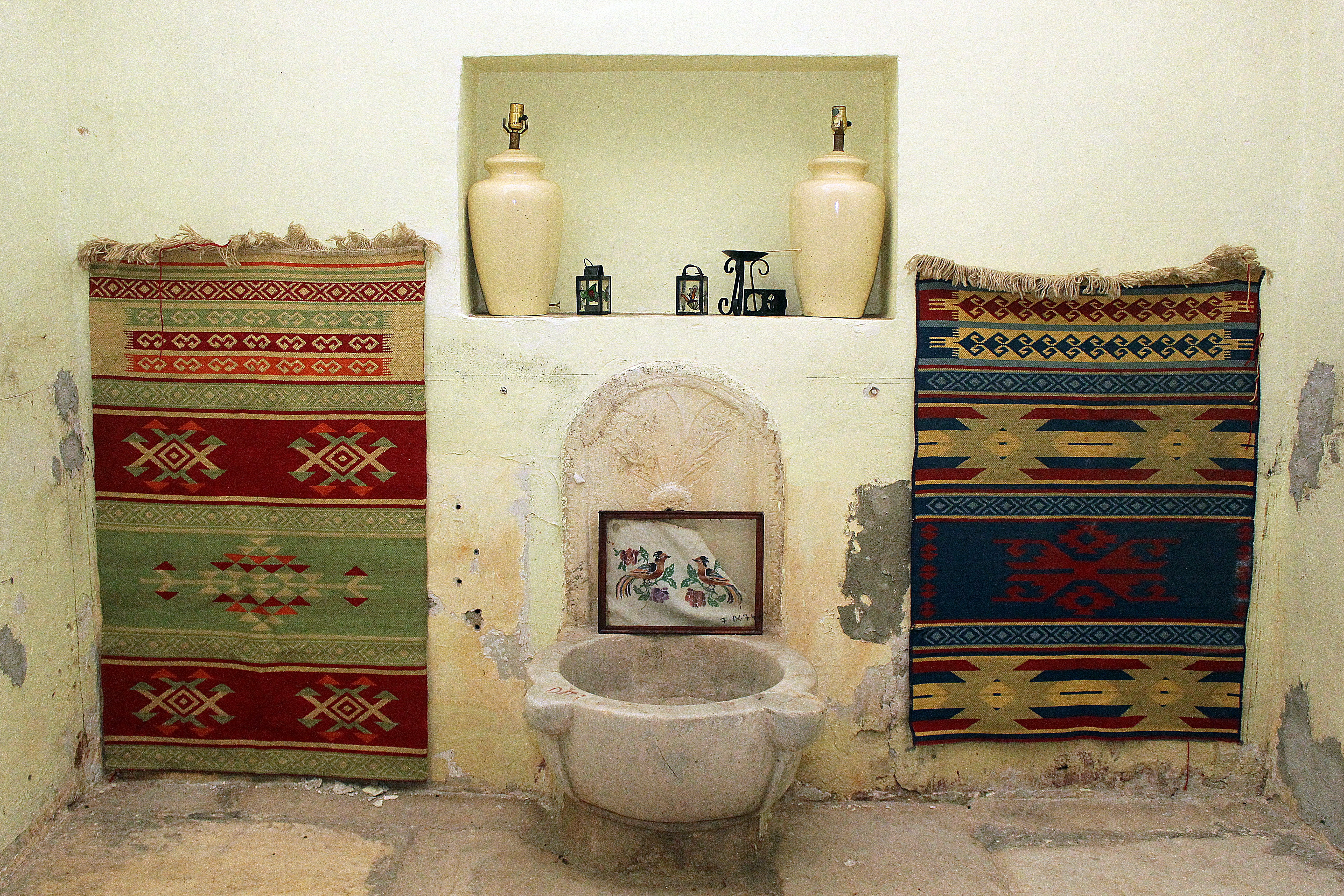 Ndërtesa e Hamamit të Vjetër